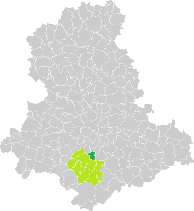 Carte de situation de la commune de Saint-Maurice-les-Brousses (en vert foncé) dans le votre Canton (en vert clair) sur une carte des communes de la Haute-Vienne